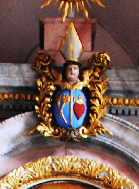 Wappen, Augustin Voit, Seitenaltar, Maria de Rosario, Dimbach